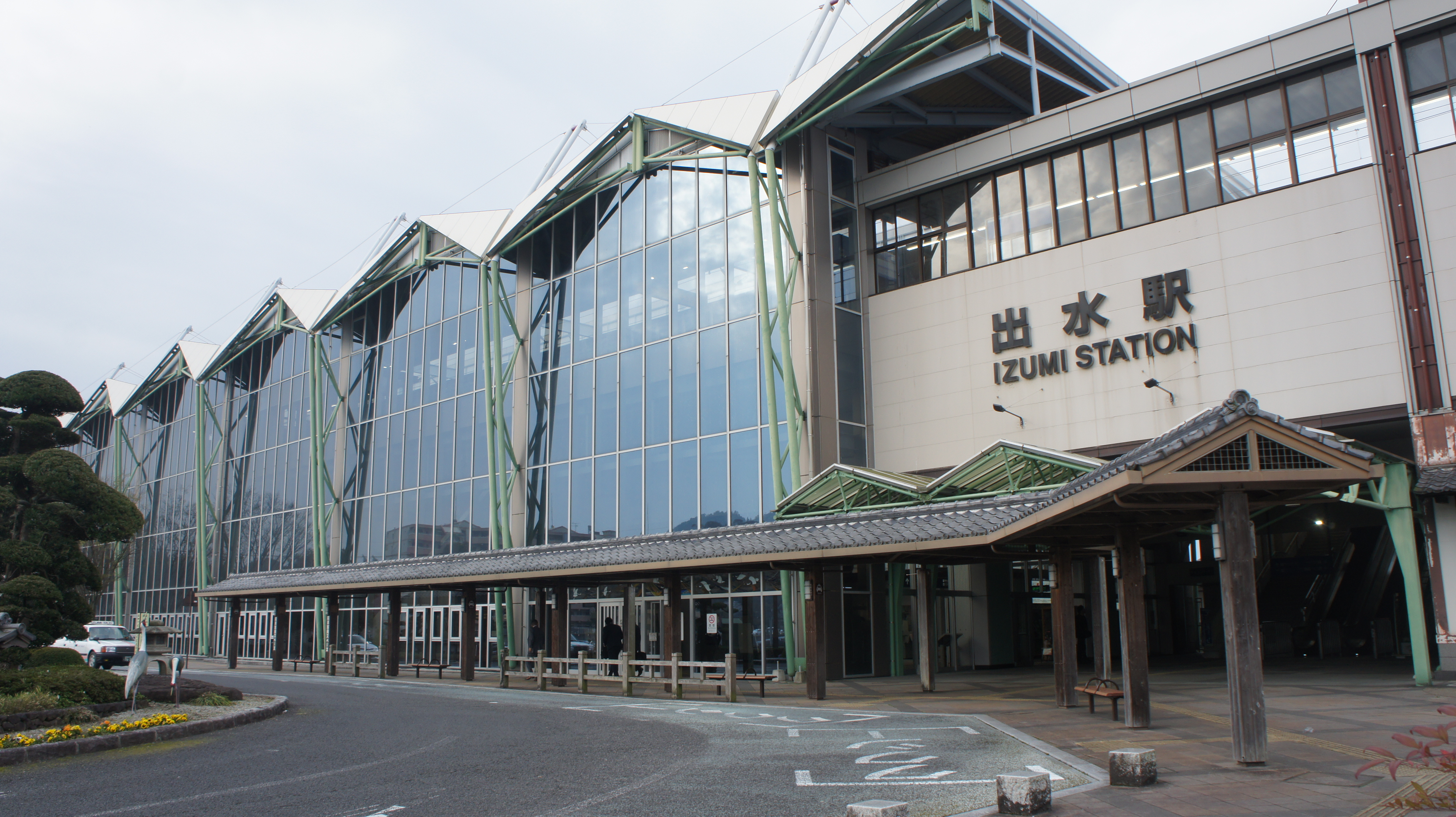 出水駅の駅舎です。